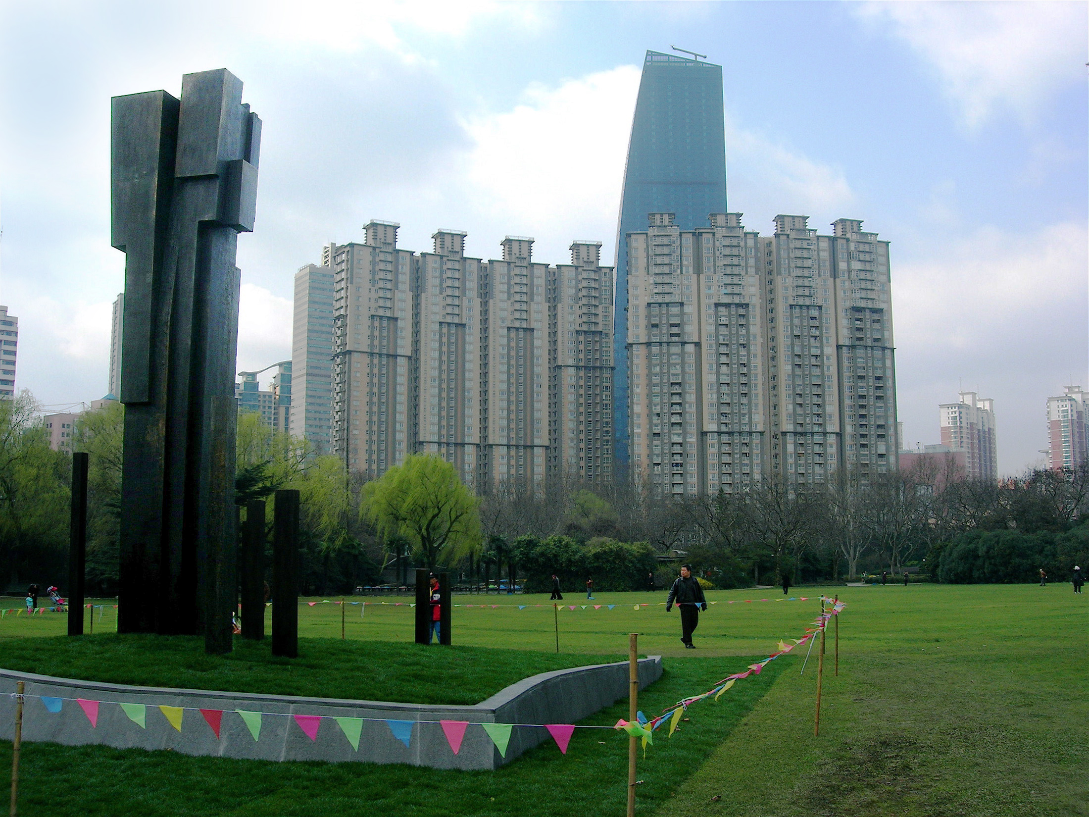 Pomnik Chopina w Parku im. Sun Jat-senta w Szanghaju